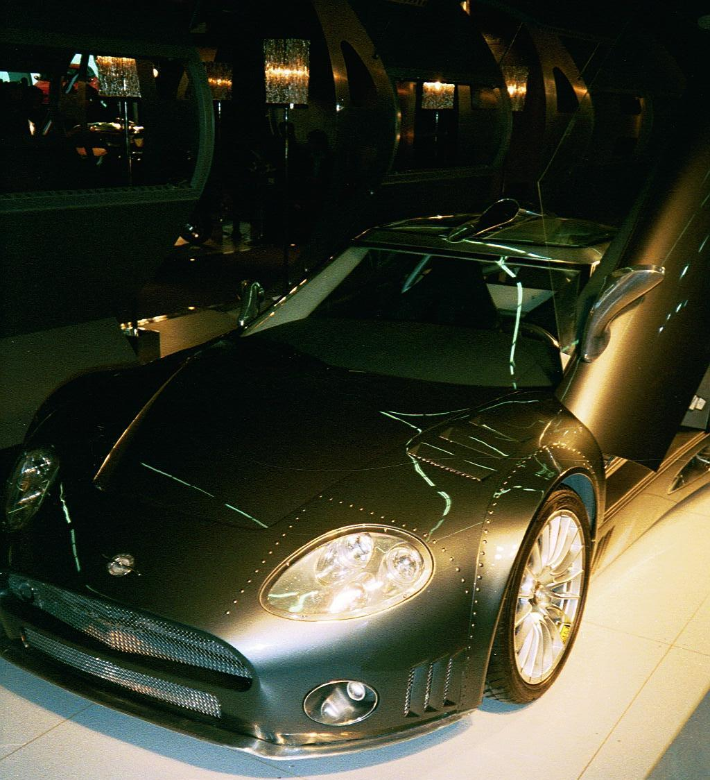 Spyker C8 op de RAI (Amsterdam)